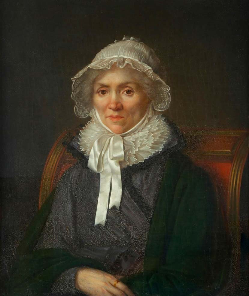 Екатерина Илларионовна Васильчикова, урождённая Овцына (1754-1832), жена Василия Алексеевича Васильчикова.